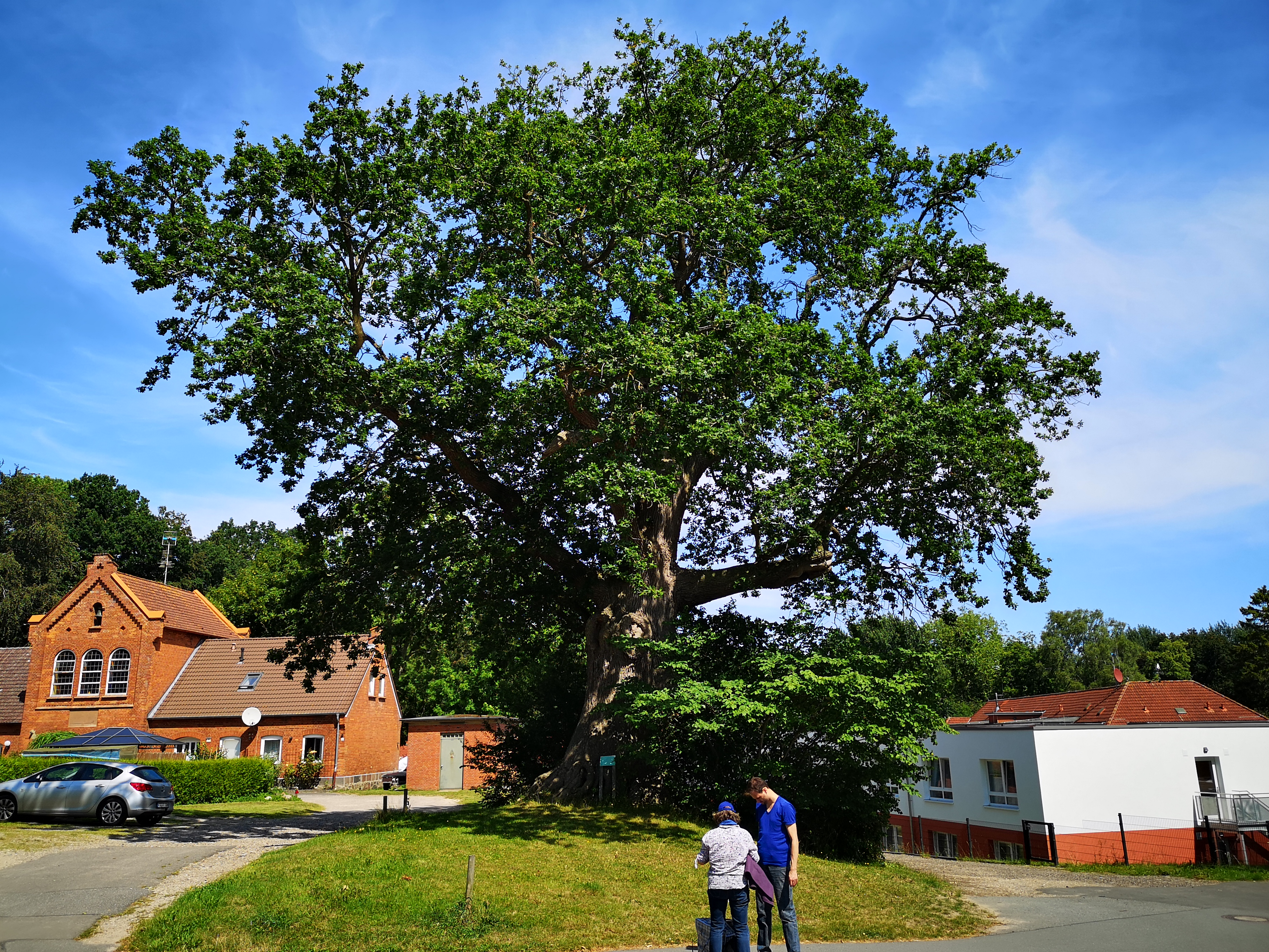 Stiftseiche in Dänisch-Nienhof (Schwedeneck, Schleswig-Holstein)